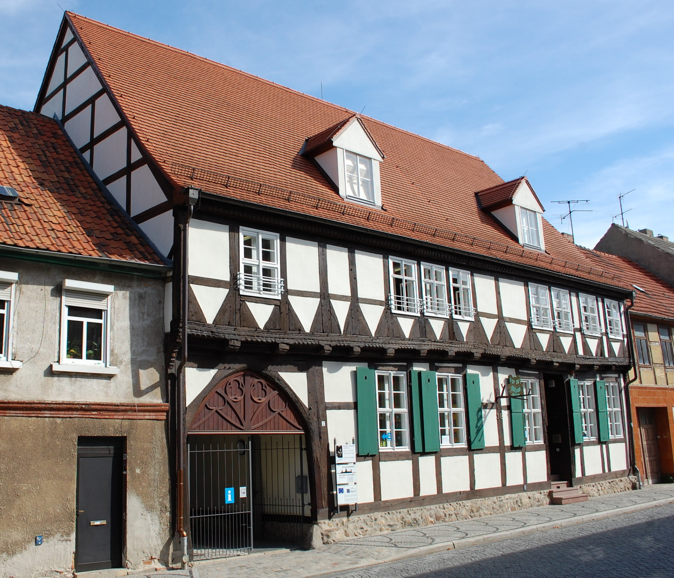 Burg Stadtbibliothek